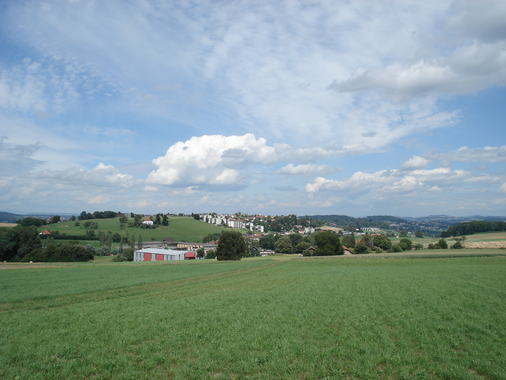 Avry switzerland